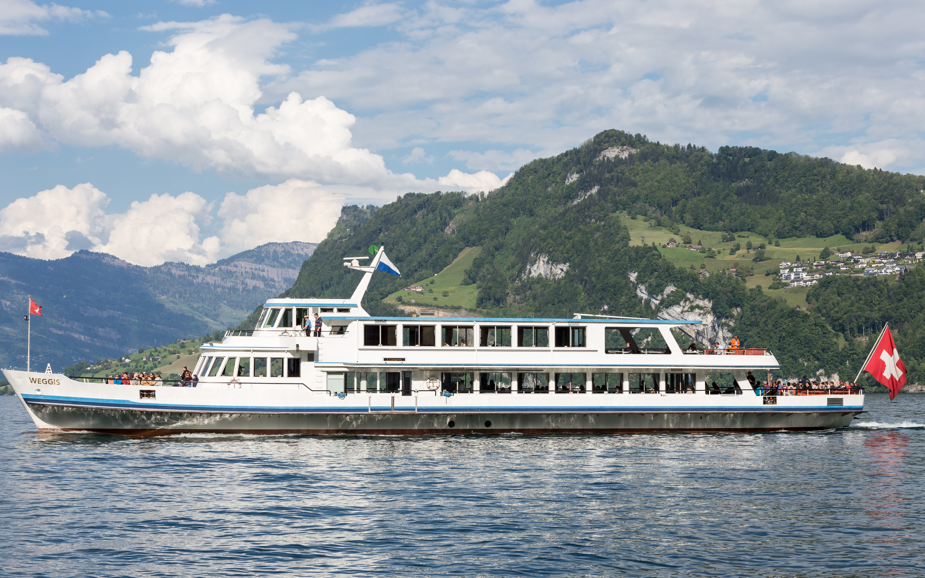 MS Weggis läuft Hergiswil an (2014)